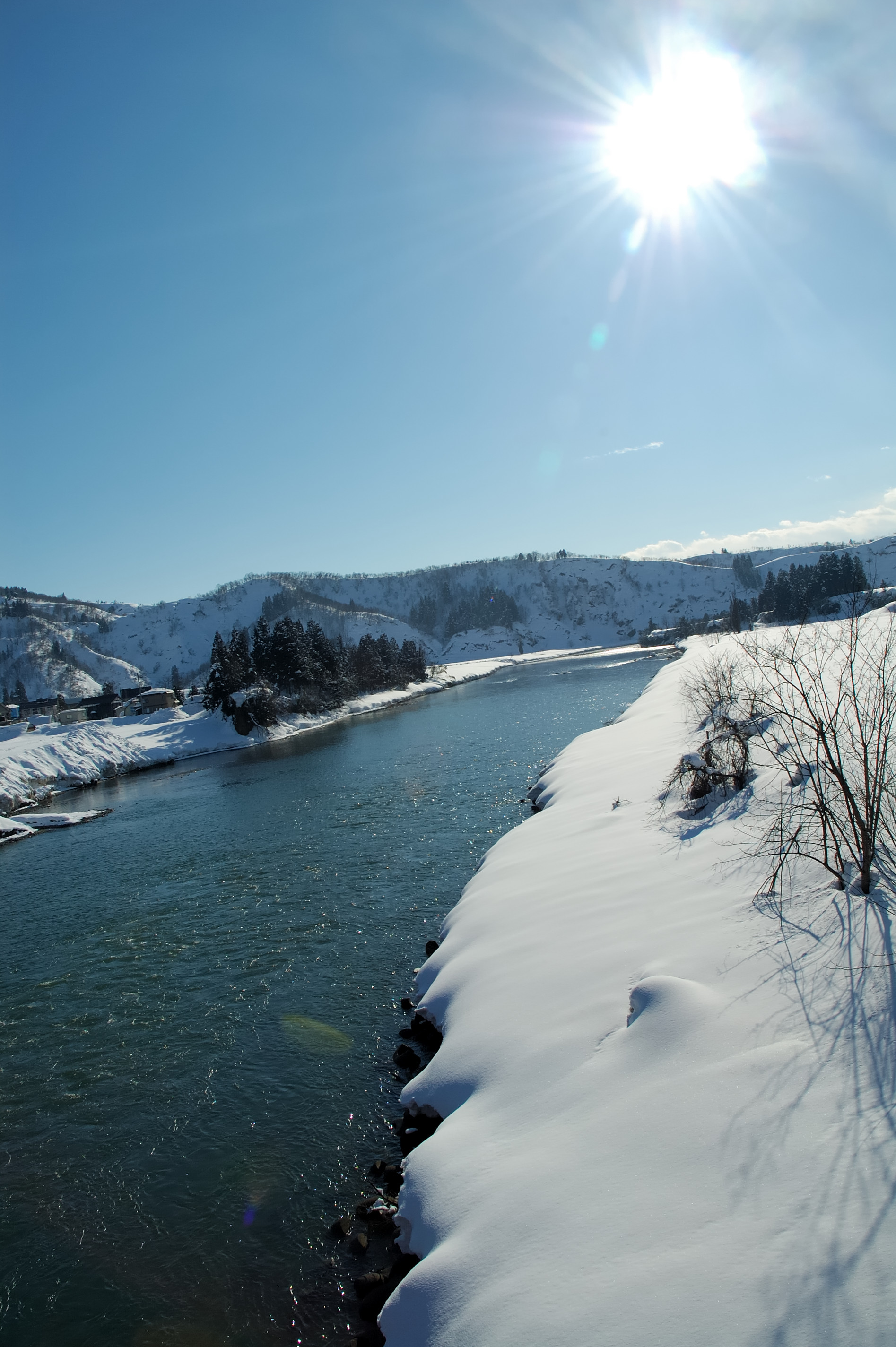 Uono River (魚野川、新潟県川口町にて撮影)